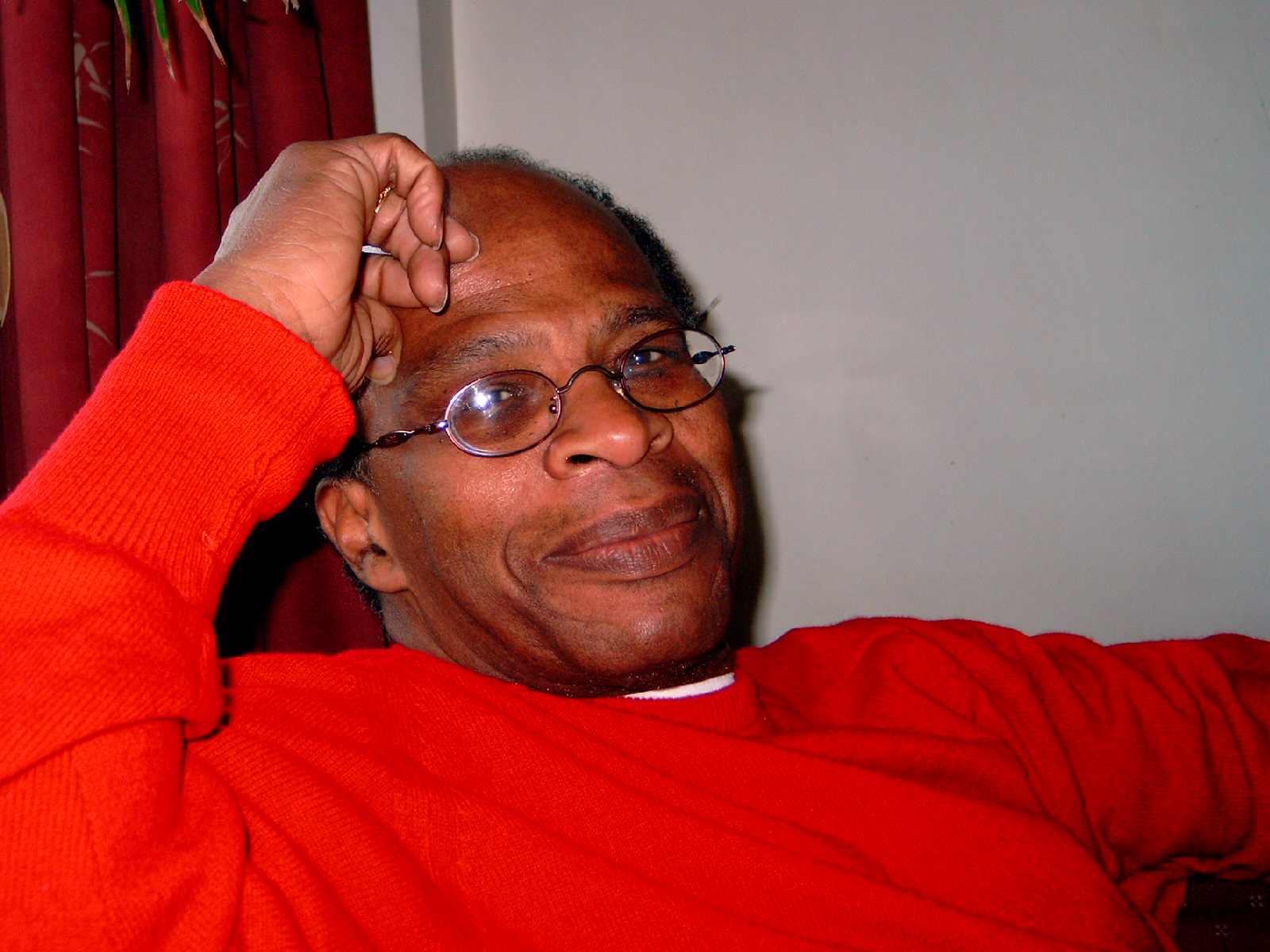 Hugo Enser, Surinamist. Eigen opname, voor publiek domein.